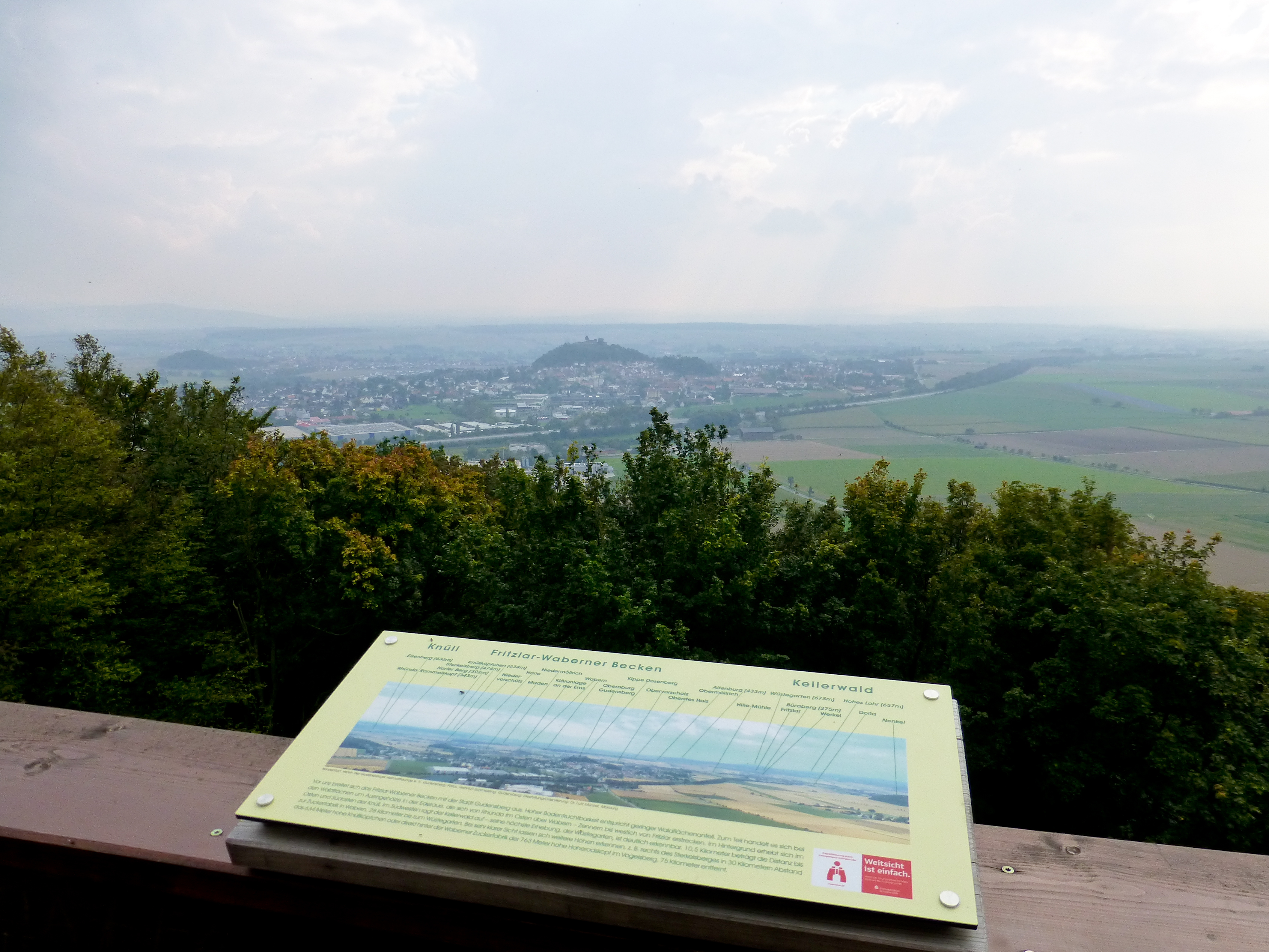 Odenbergturm; Blick von der Aussichtsplattform der 4. Ebene nach Süden in Richtung Gudensberg